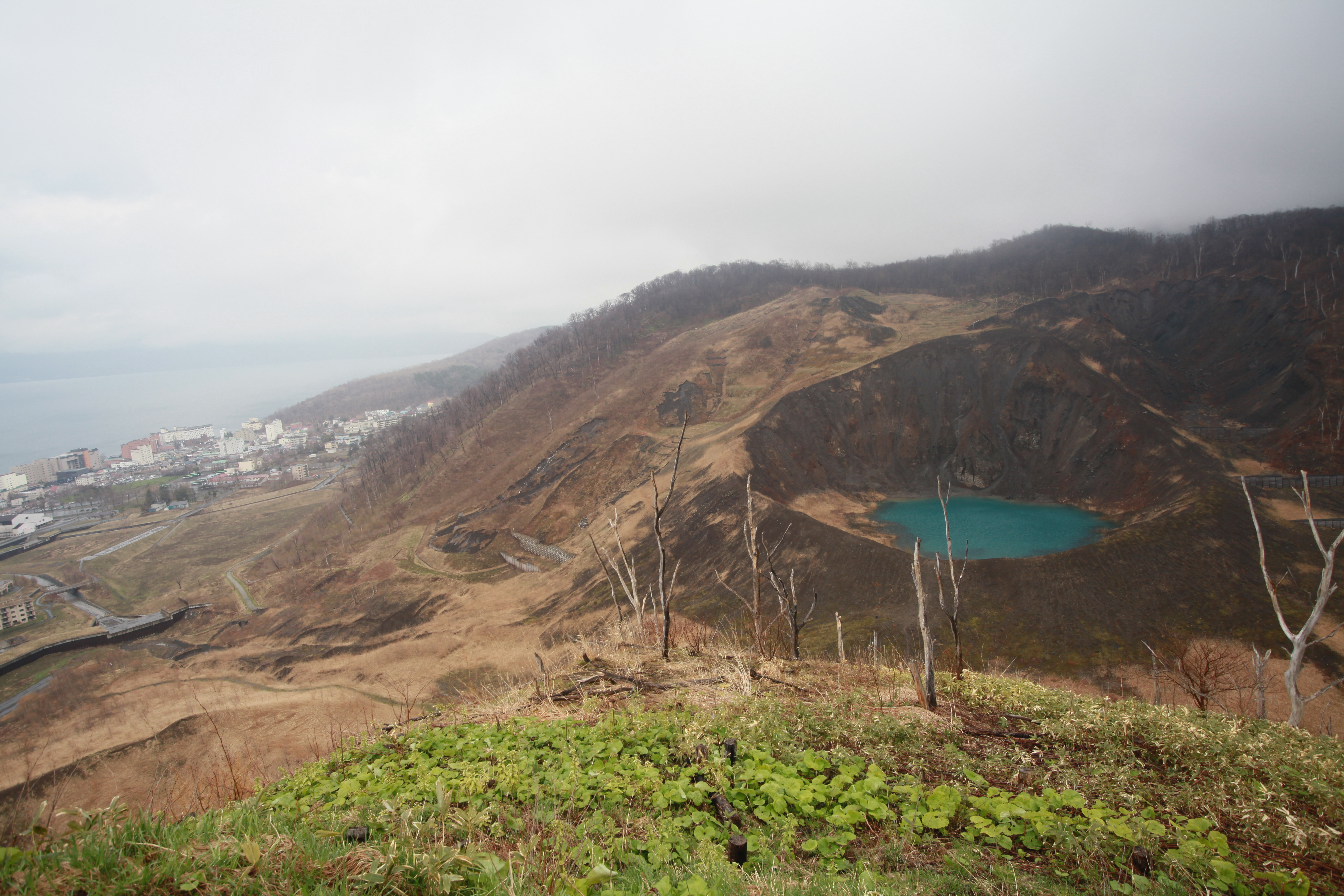 有珠山の金毘羅山噴火口と、洞爺湖温泉街